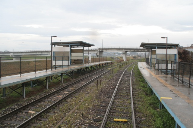 田川市立病院駅